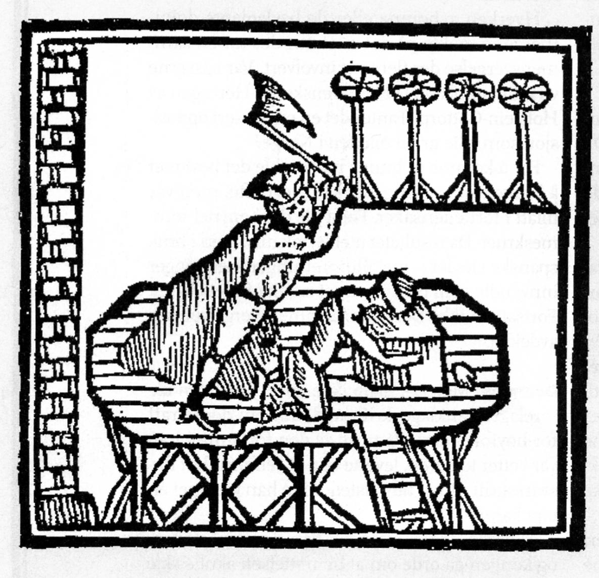 Povel Juel på skafottet